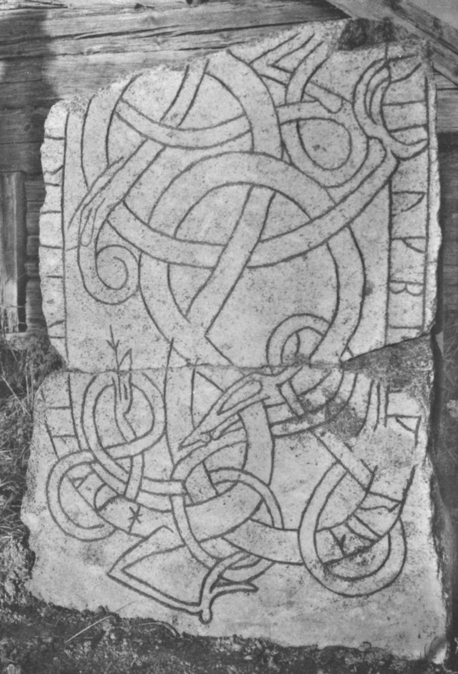 Runinskrift U856, Frövi, Balingsta sn.